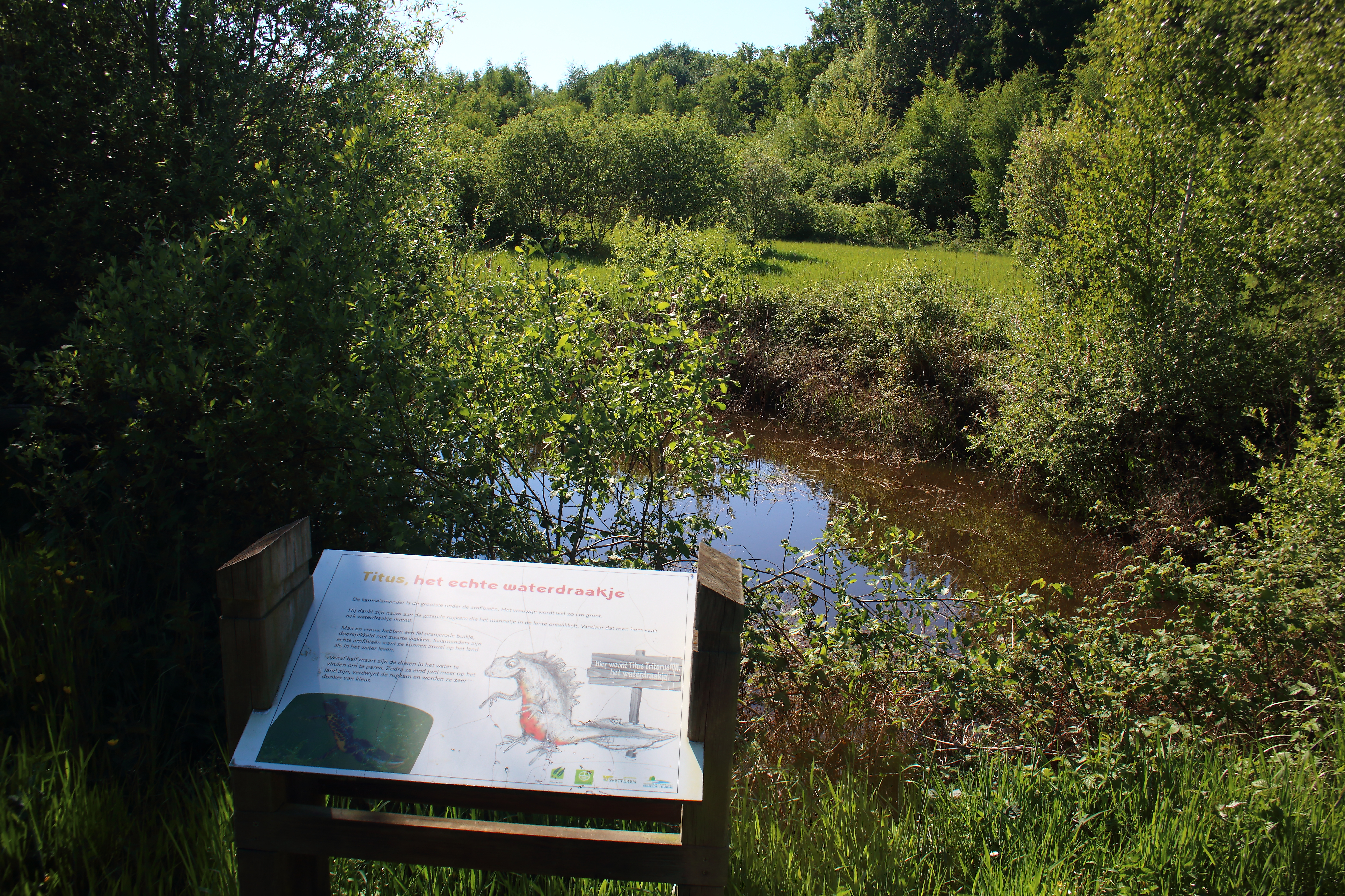 Paelepelbos, Serskampse bossen, Vlaanderen, België